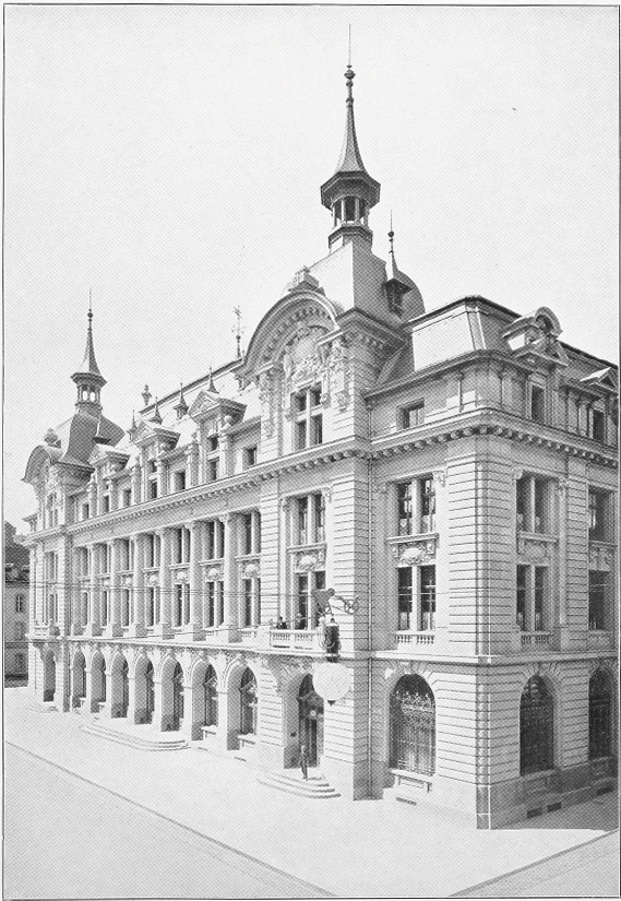 Eidgenössisches Postgebäude, Bauzeit 1901 bis 1906. Architekt: Eugène Jost und Ernst Baumgart. Fotograf: Hermann Völlger